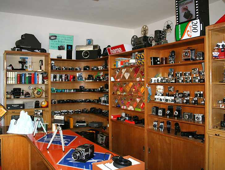 Ladenlokal Rhauderfehn des dt. Kameramuseums in Plech